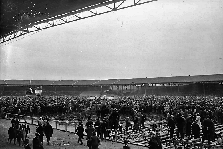 Stade-vélodrome Buffalo à Montrouge, le 24 septembre 1922, public du match de boxe Carpentier-Siki